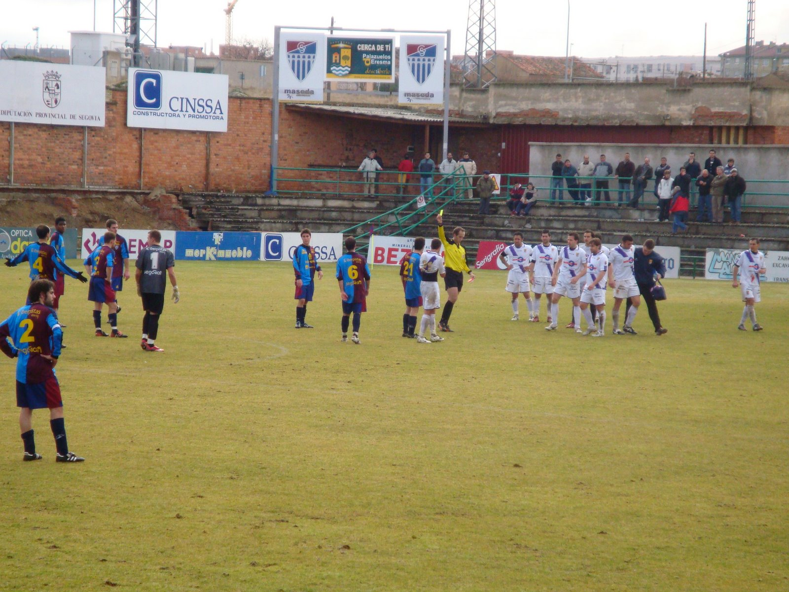 Partido de la Gimnástica Segoviana CF en La Albuera. Segunda división "B" temporada 2009-2010